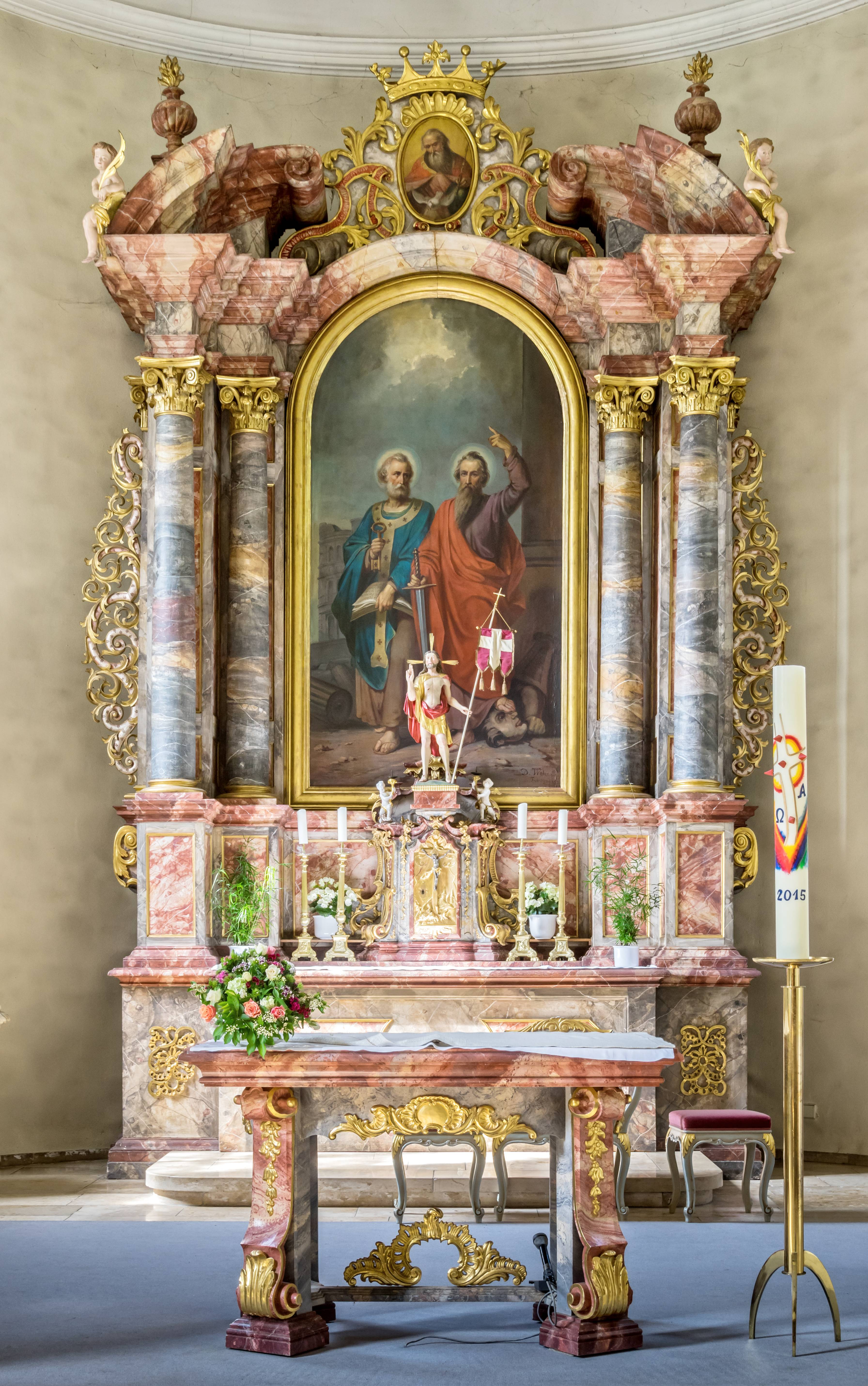 Bilder aus Freiburg von der Kirche St.Peter und Paul in Freiburg Kappel Der Hauptaltar mit dem Peter und Paul Bild, Dominik Weber